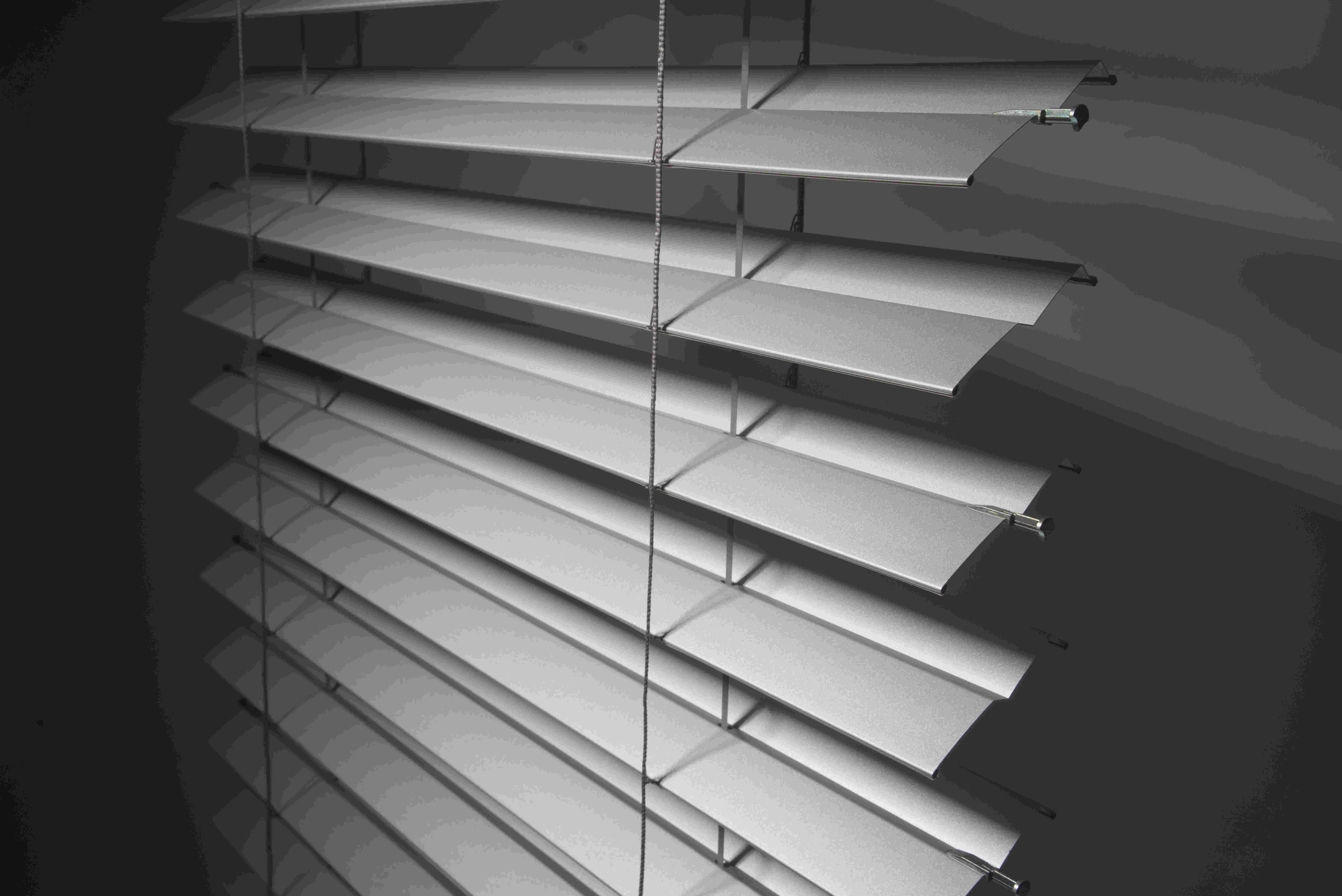 venkovní žaluzie ve tvaru písmena Z , která zajistí dokonalý SUNBLOCK